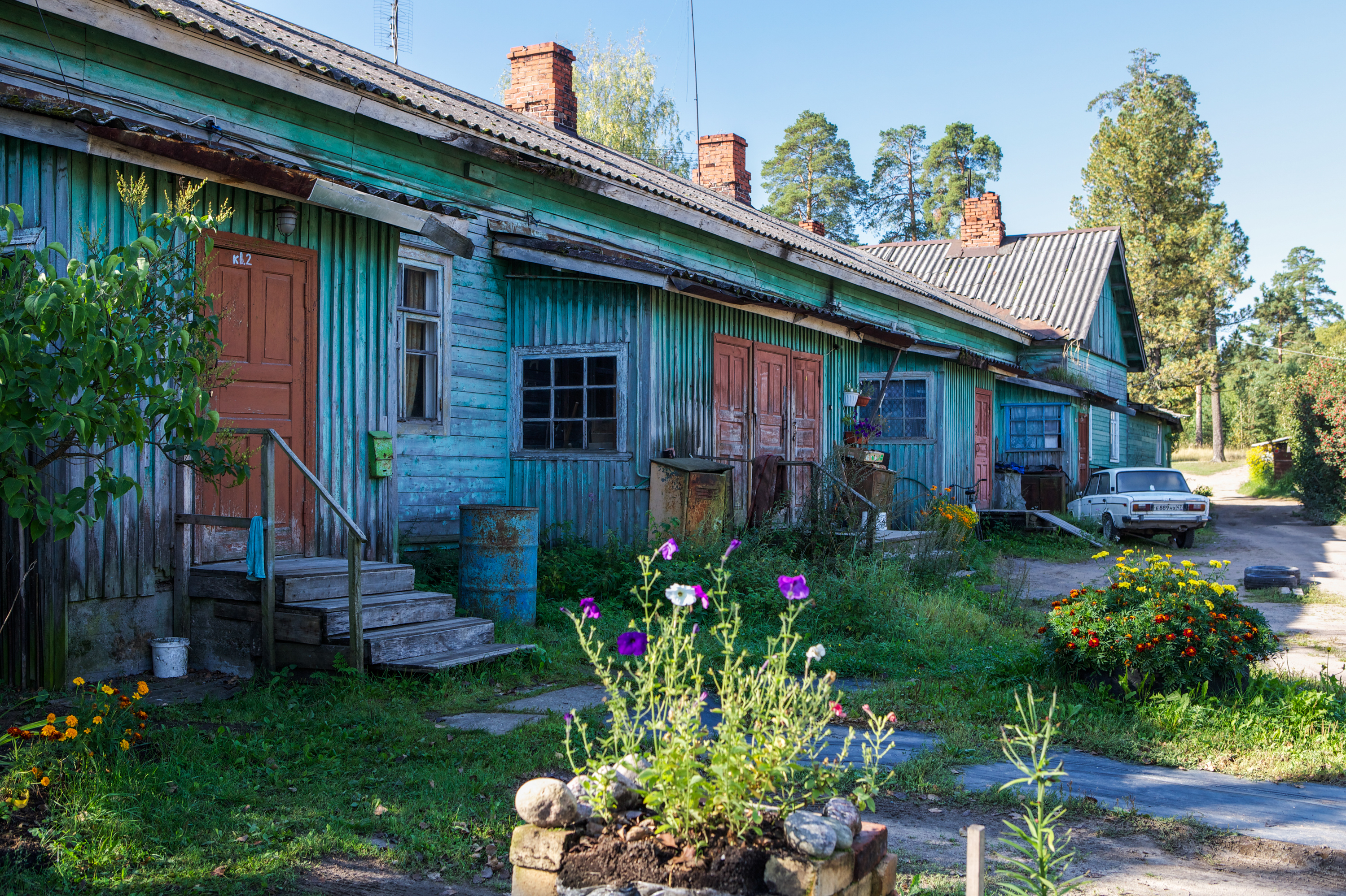 Kamennogorsk Karjalankannaksella. Talon asukkaiden mukaan rakennus on entinen Antrean linja-autoasema.